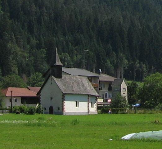 Kath. Filialkirche hl. Dreifaltigkeit (St. Trinitas und Antonius von Padua), Hermagor.